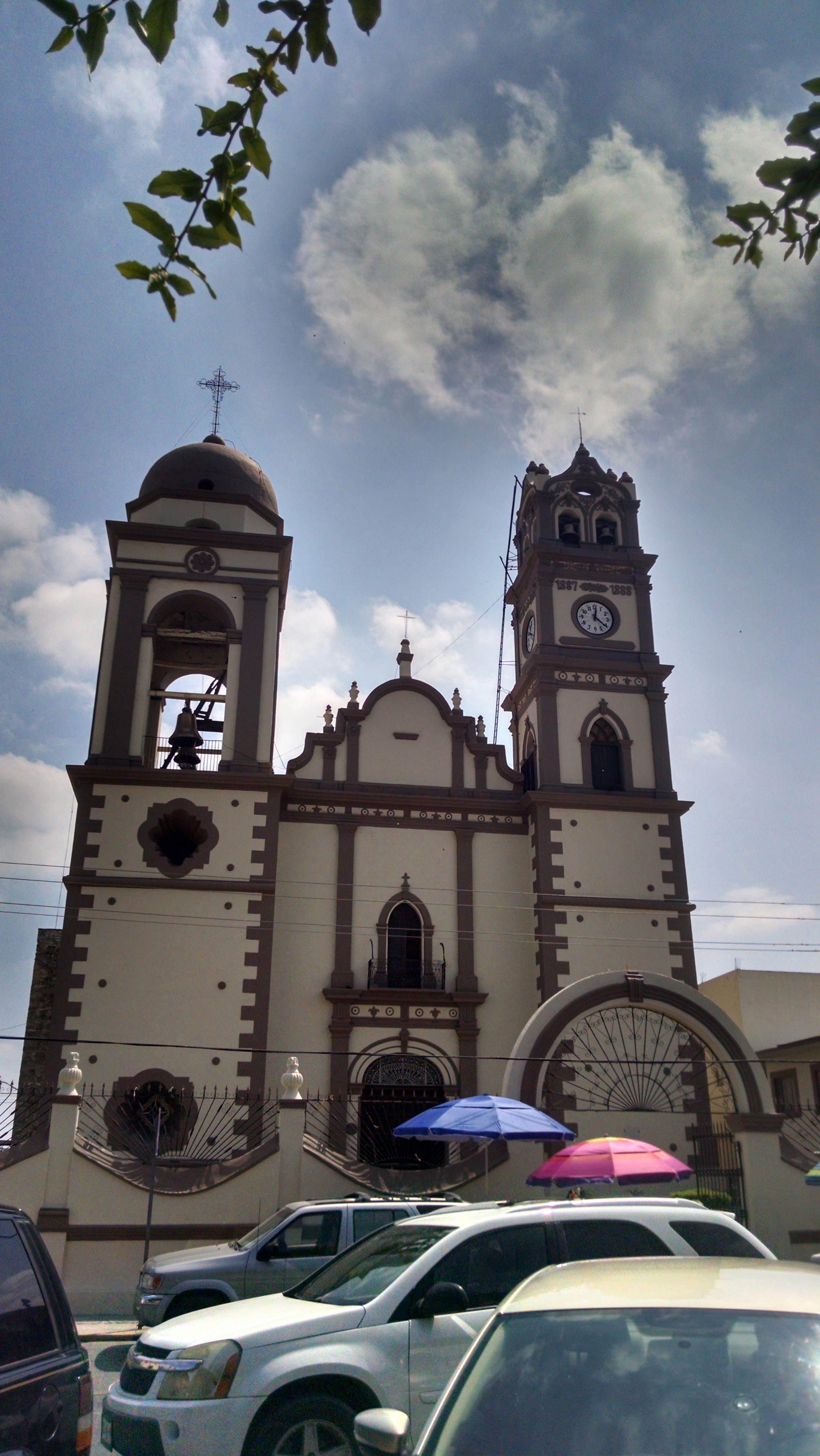 Templo de San Juan Bautista de Cadereyta